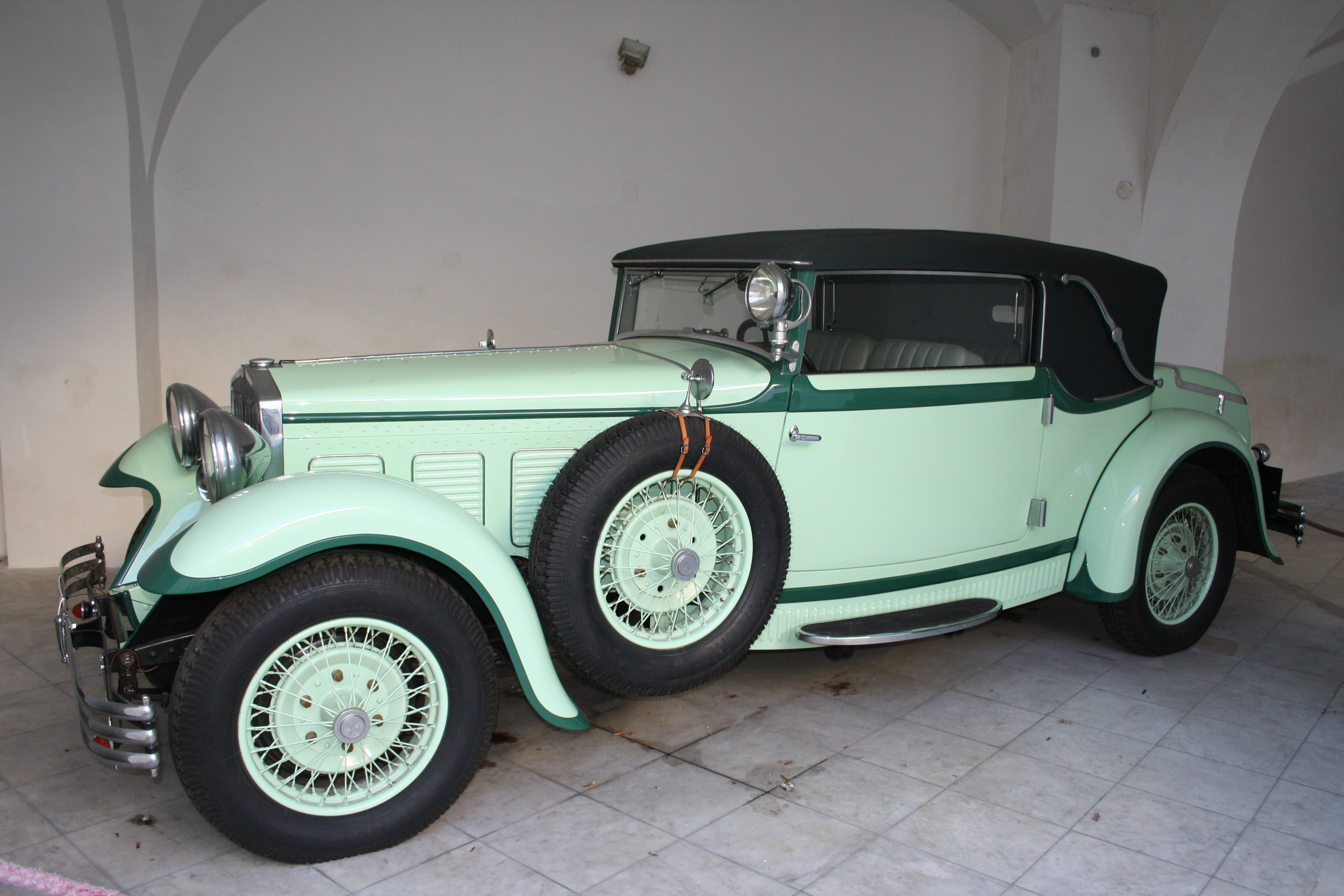 Wikow 70 erbaut 1930